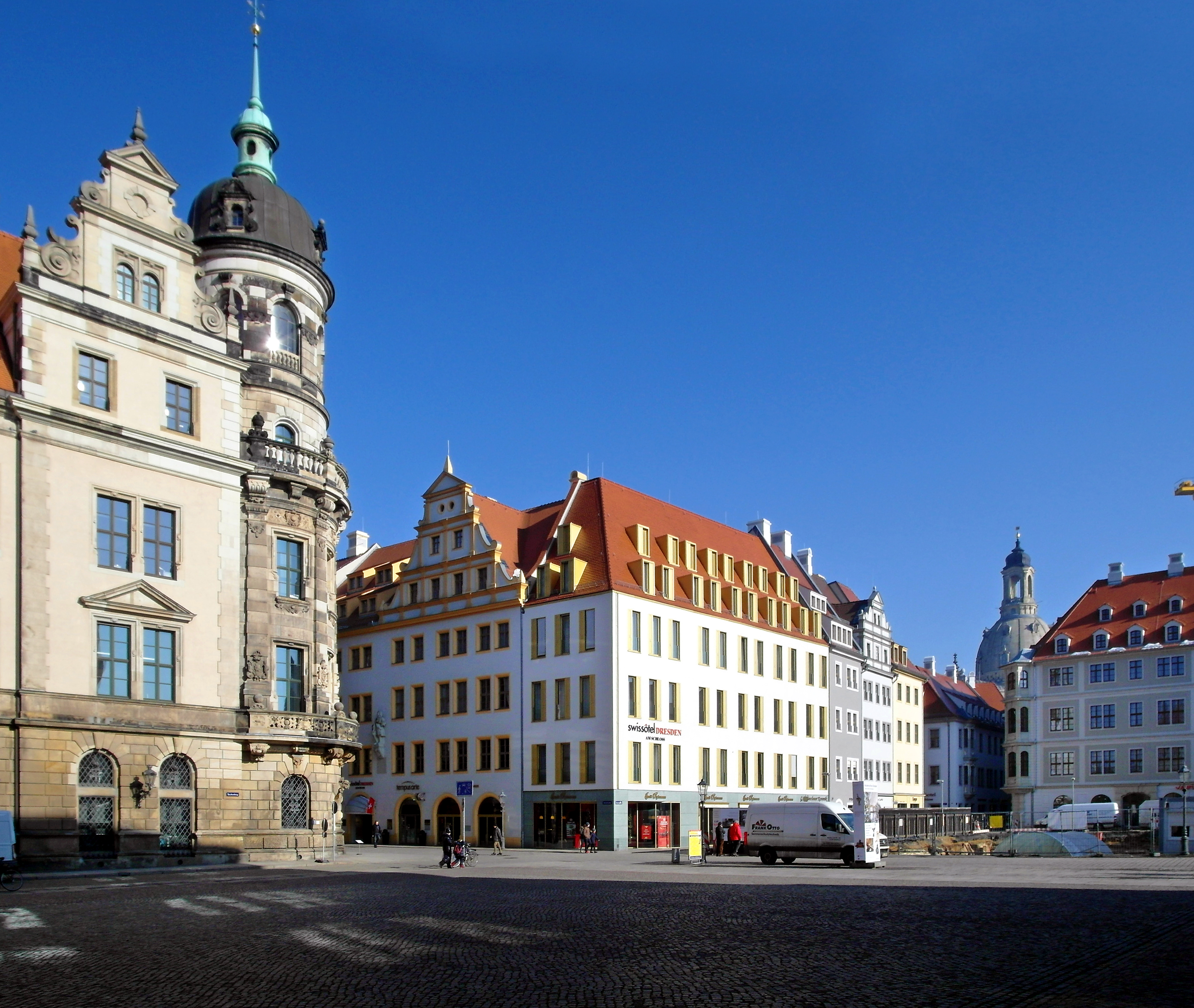 13.02.2017 01067 Dresden-Altstadt: Blick vom Taschenberg zur Südfassade des Residenzschlosses und weiter zur Ecke Schloßstraße 18 (Fraumutterhaus) / Ecke Sporergasse 1, 3, 5 (zum Schloßhotel = SWISSOTEL gehörend). Durchblick zur Frauenkirche. Rechts die gerade errichteten Gebäude vom Jüdenhof, Schössergasse 14 / Ecke Sporergasse (VAPIANO). [SAM8235.JPG]20170213220DR.JPG(c)Blobelt